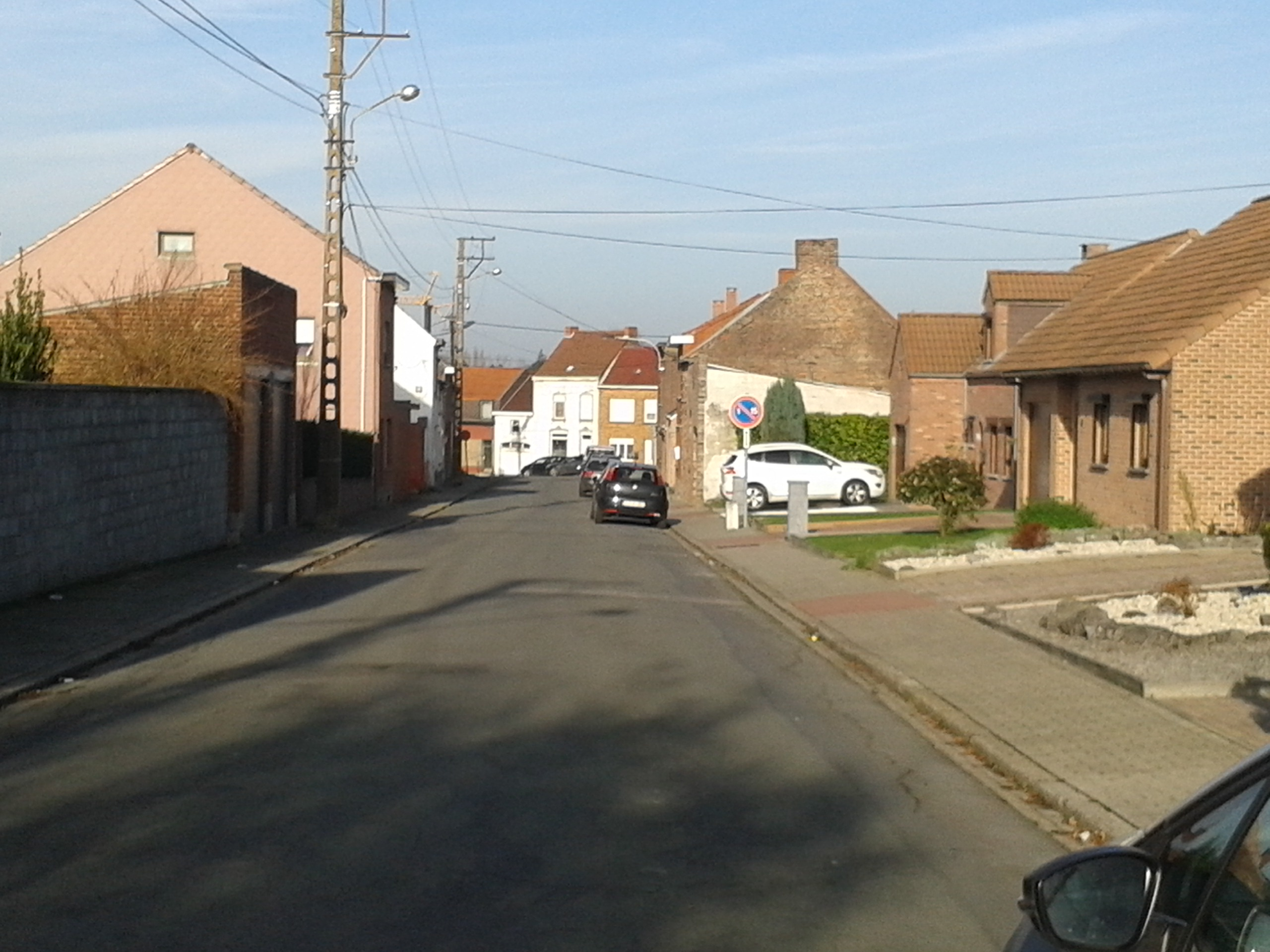 Rue Benoit Malon, 7340 Colfontaine ( Belgique )